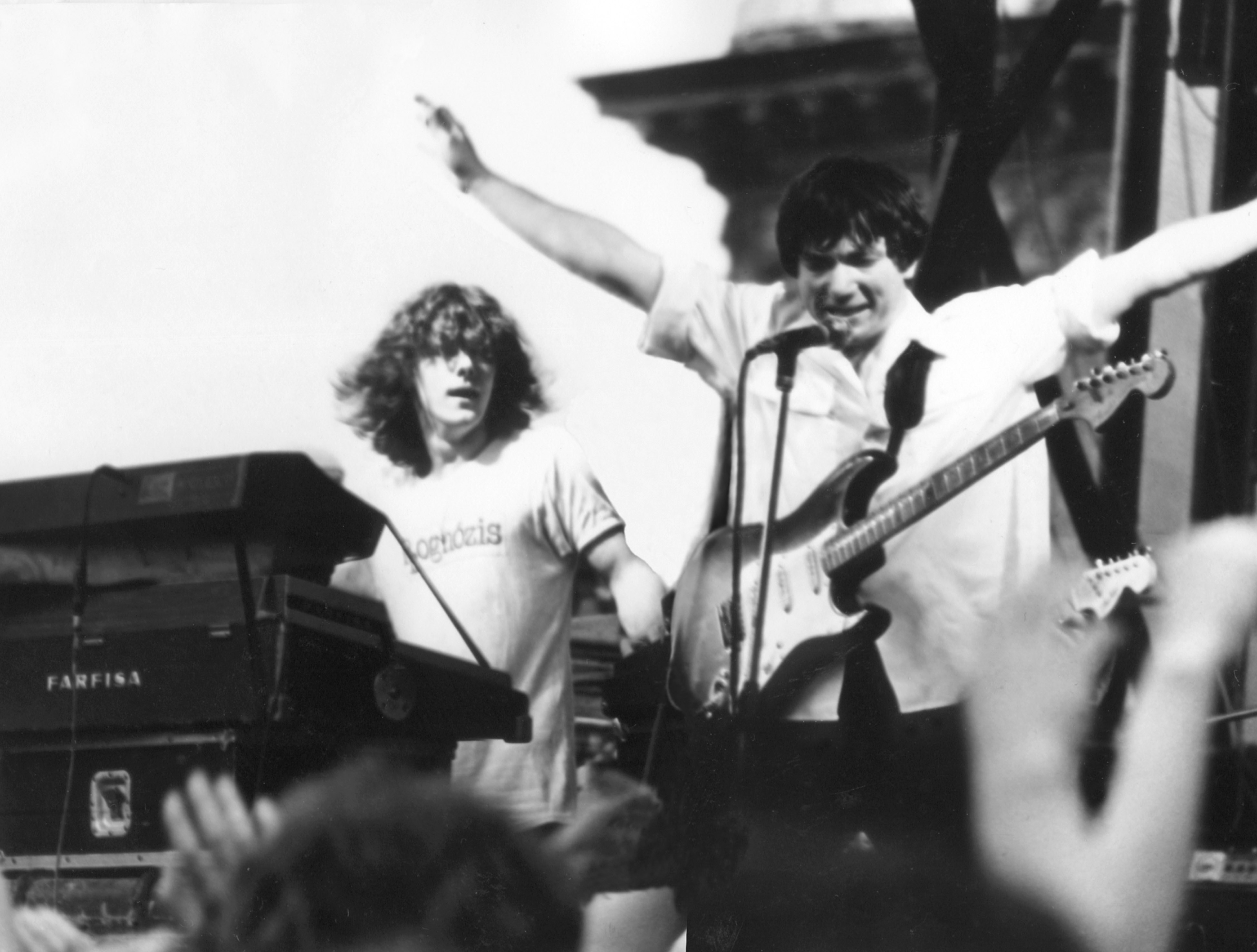 Prognózis koncert a budapesti Ifjúsági Parkban (Jankai Béla és Vörös István). Budapest, Ifjúsági Park.